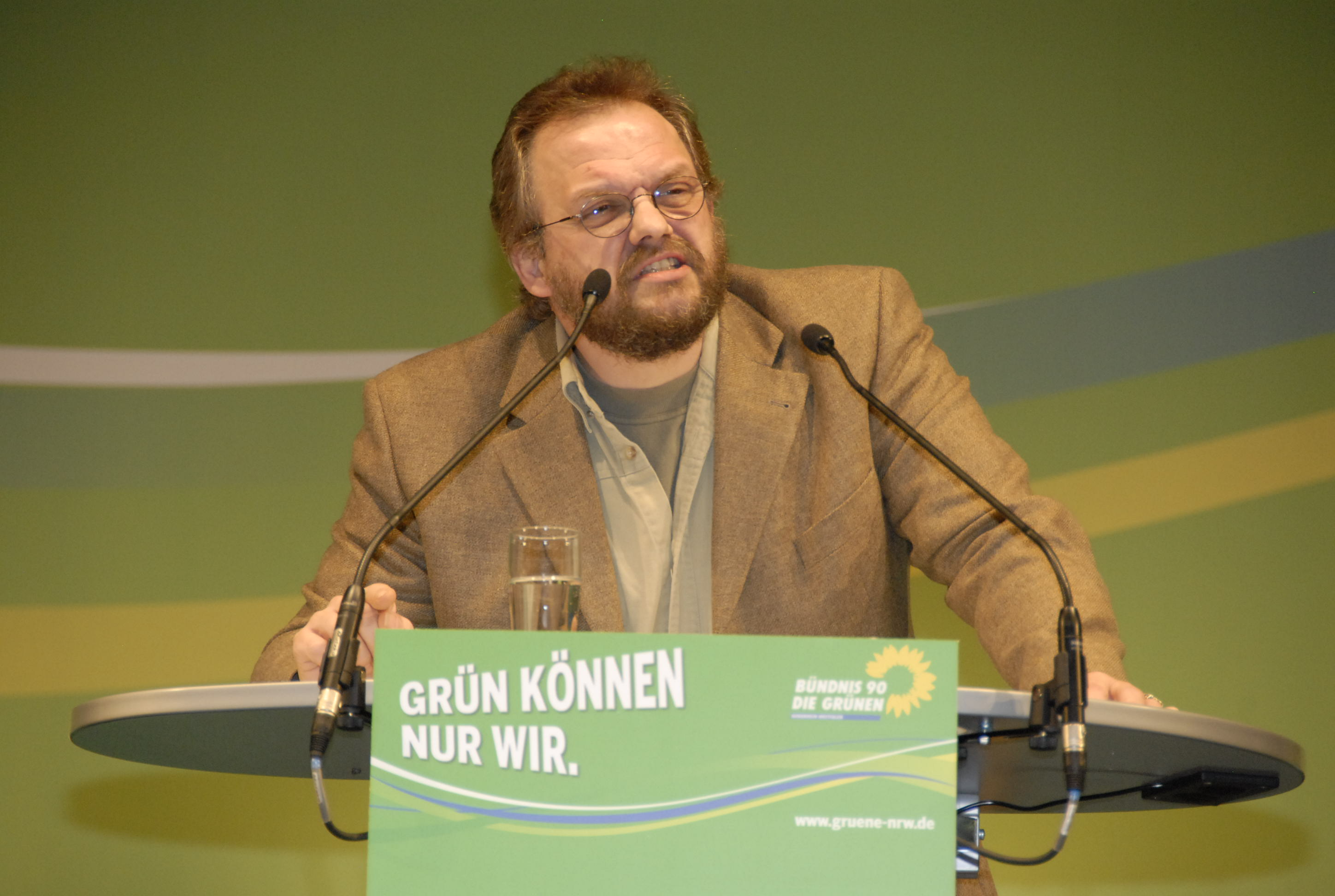 Fred Hansen LDK Hamm 2009-11